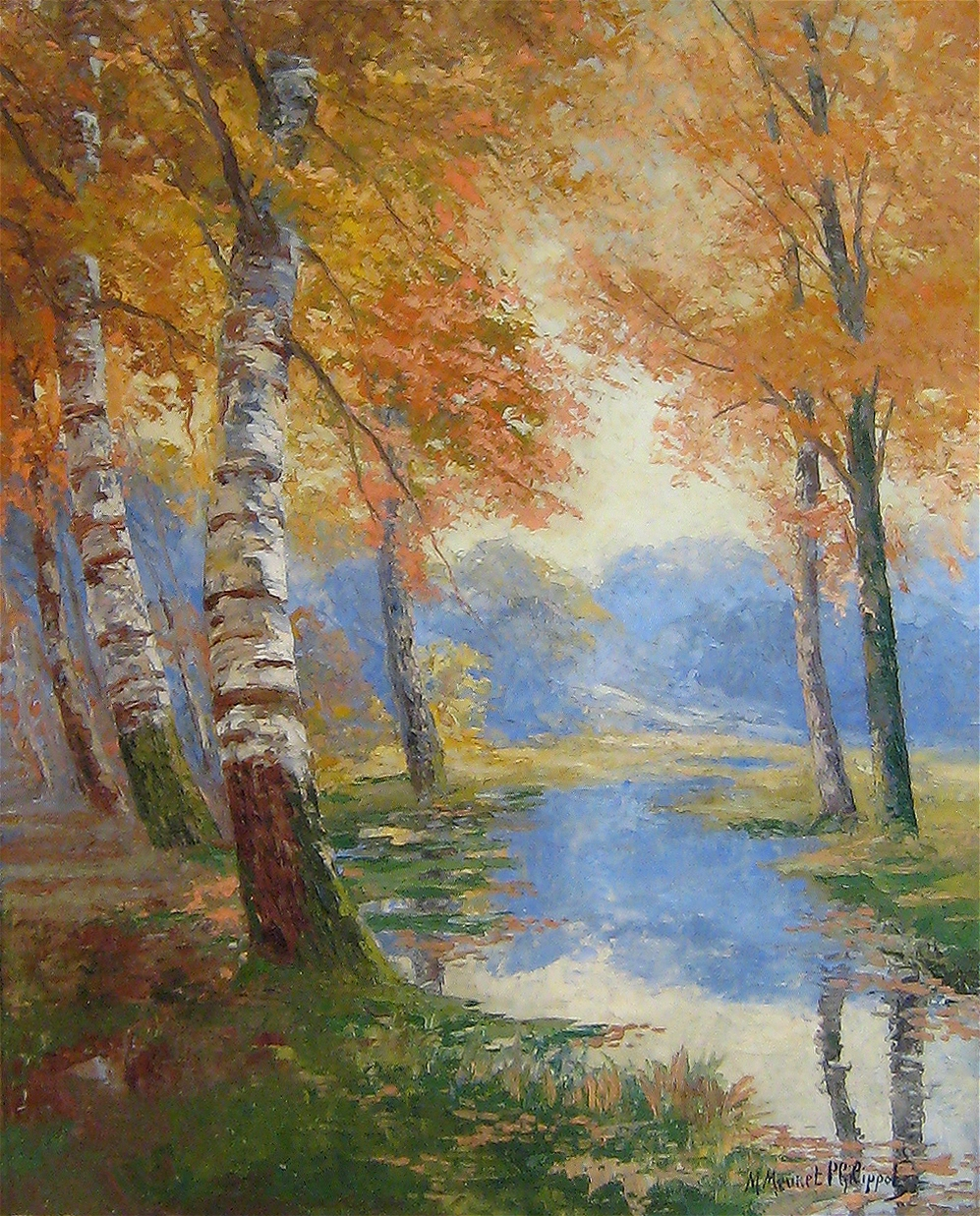 Le ruisseau tranquille